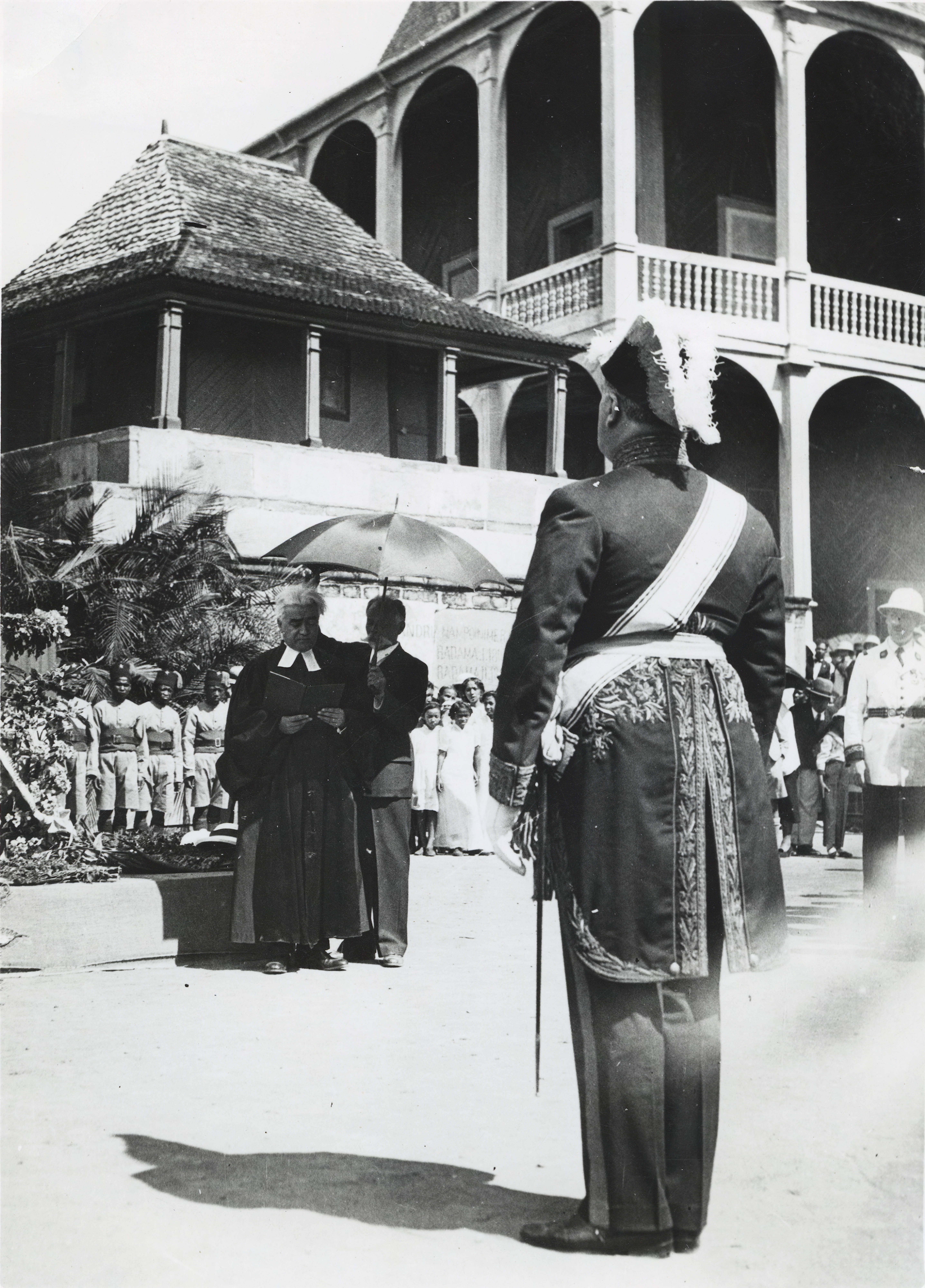 Réinhumation des restes mortels de Ranavalona III au Palais de la Reine, Rova de Tananarive.